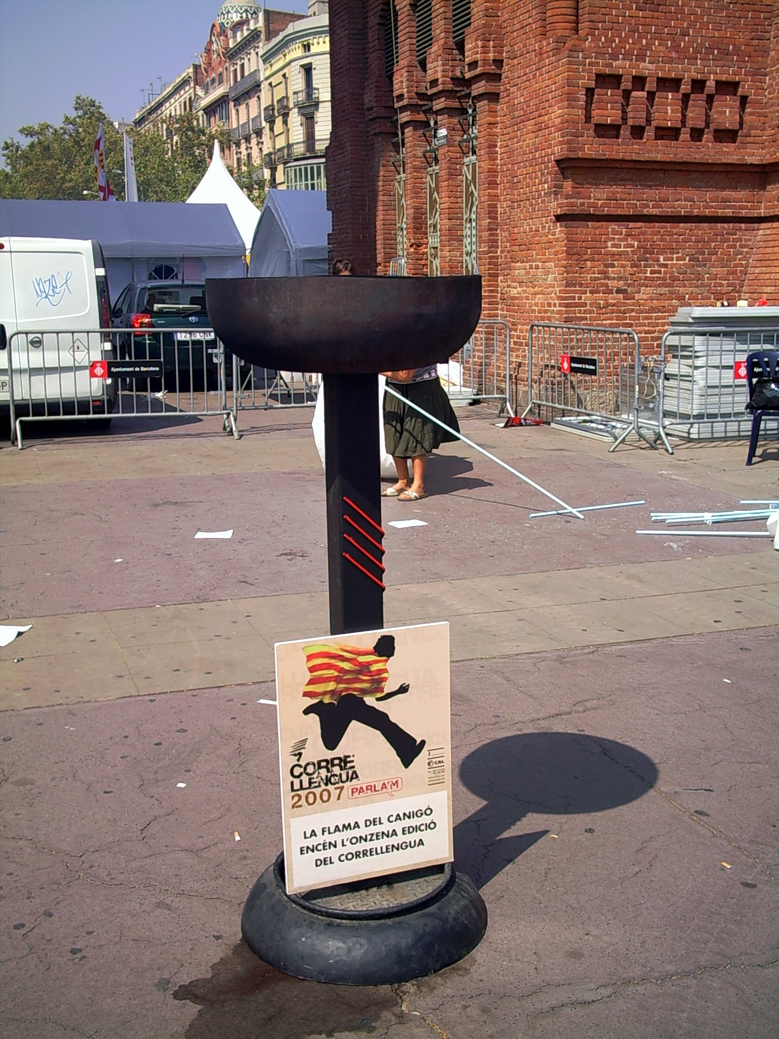 Flama del Canigó, símbol de la llengua Catalana, portada a Barcelona, pel Correllenguaa l'Arc de Triomf de Barcelona, (Catalunya), la Diada, de 2007.